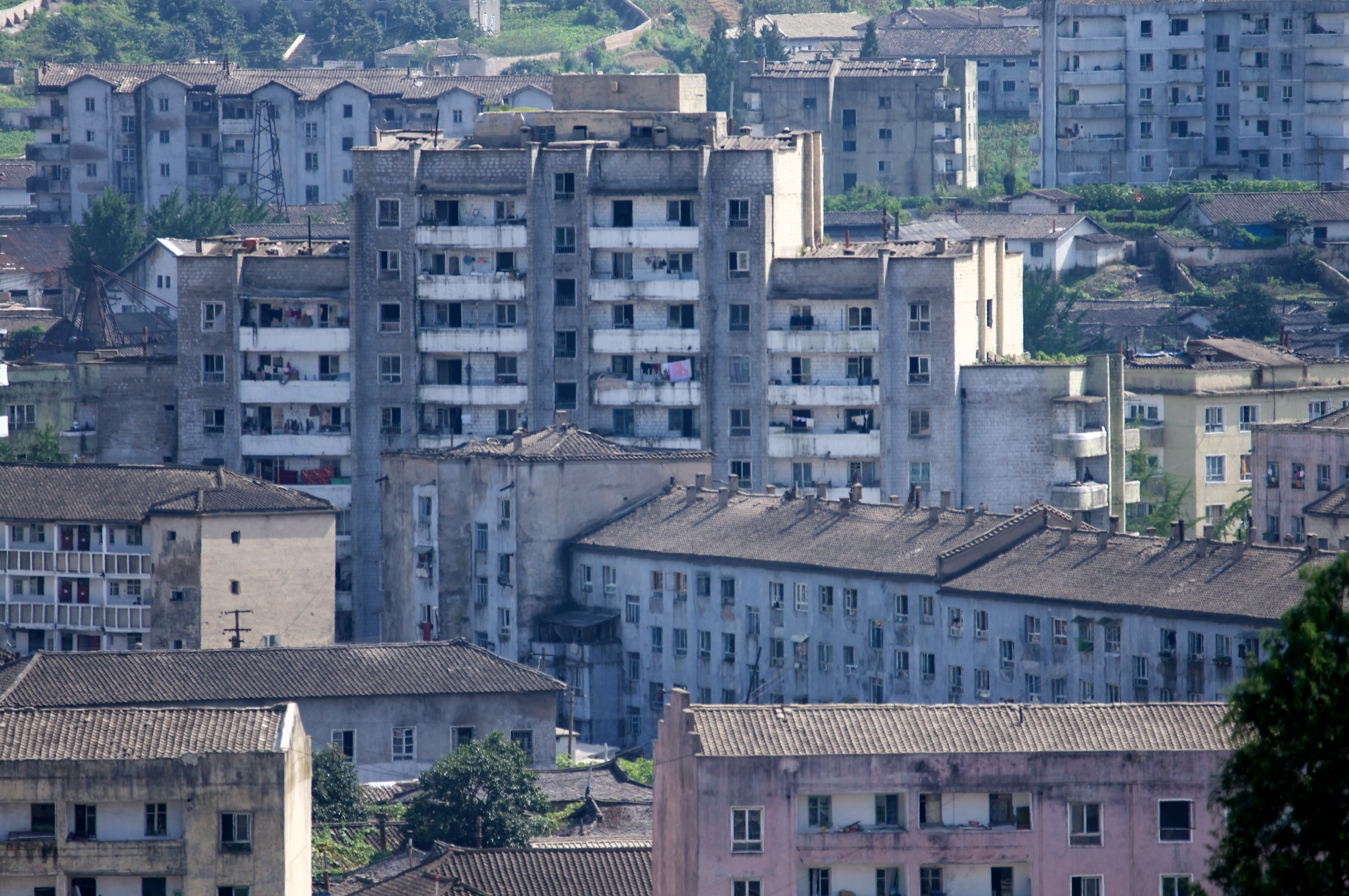 Kaesŏng skyline, DPRK, North Korea.